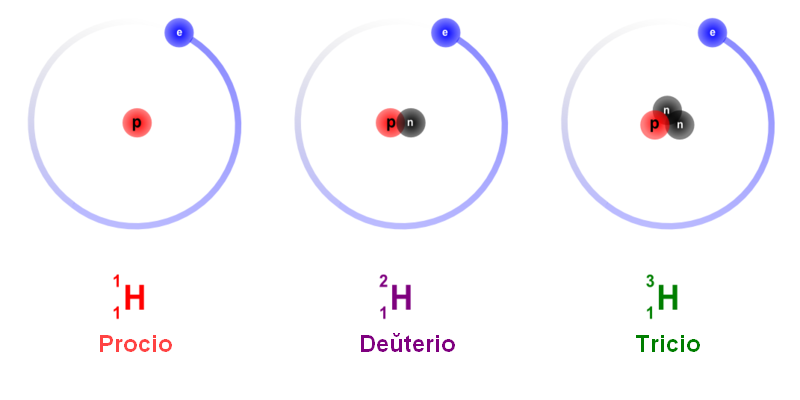 Tri naturaj izotopoj de Hidrogeno